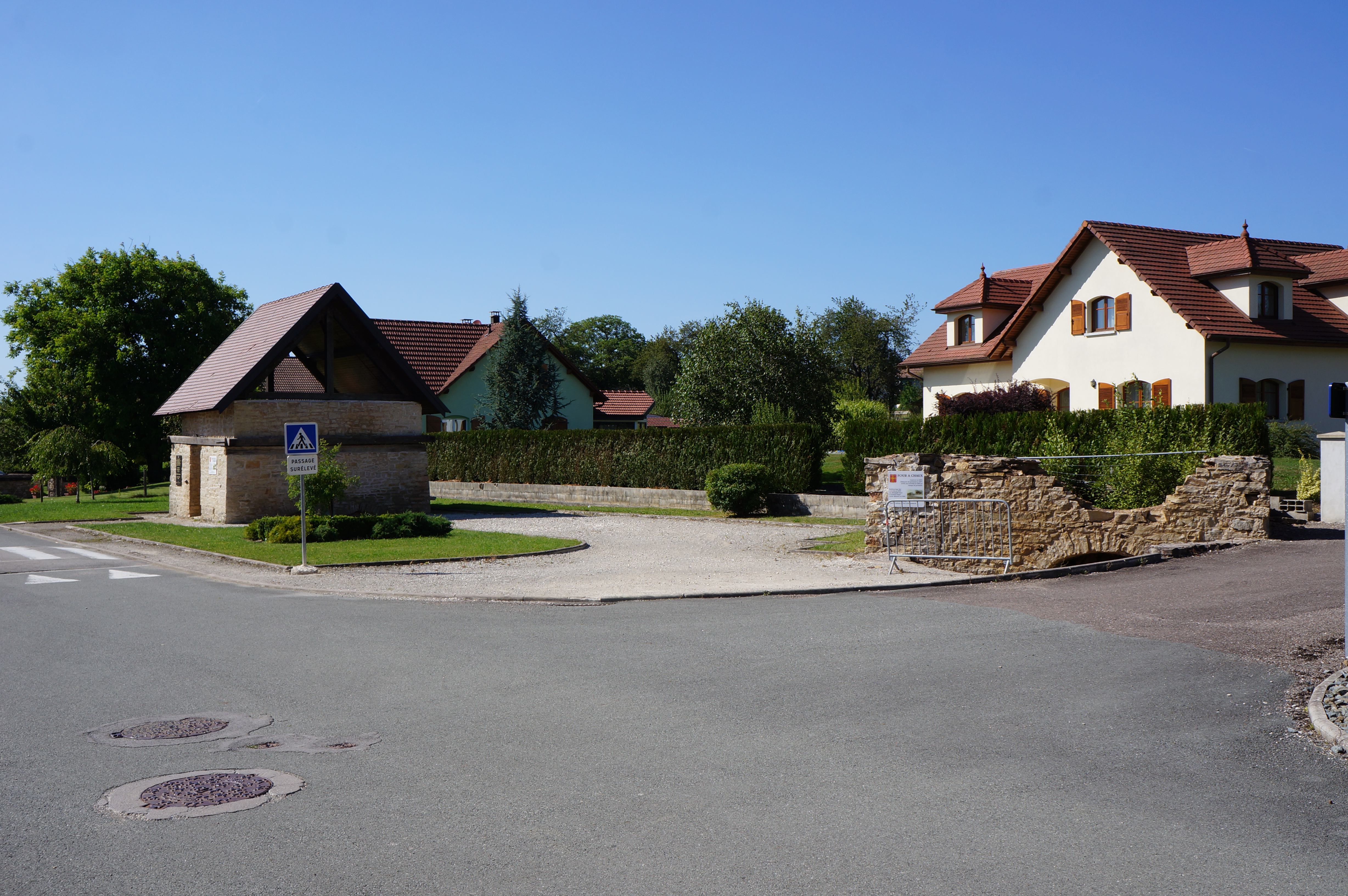 Les fours à chaux et à brique d'Abbevillers (Doubs, France).